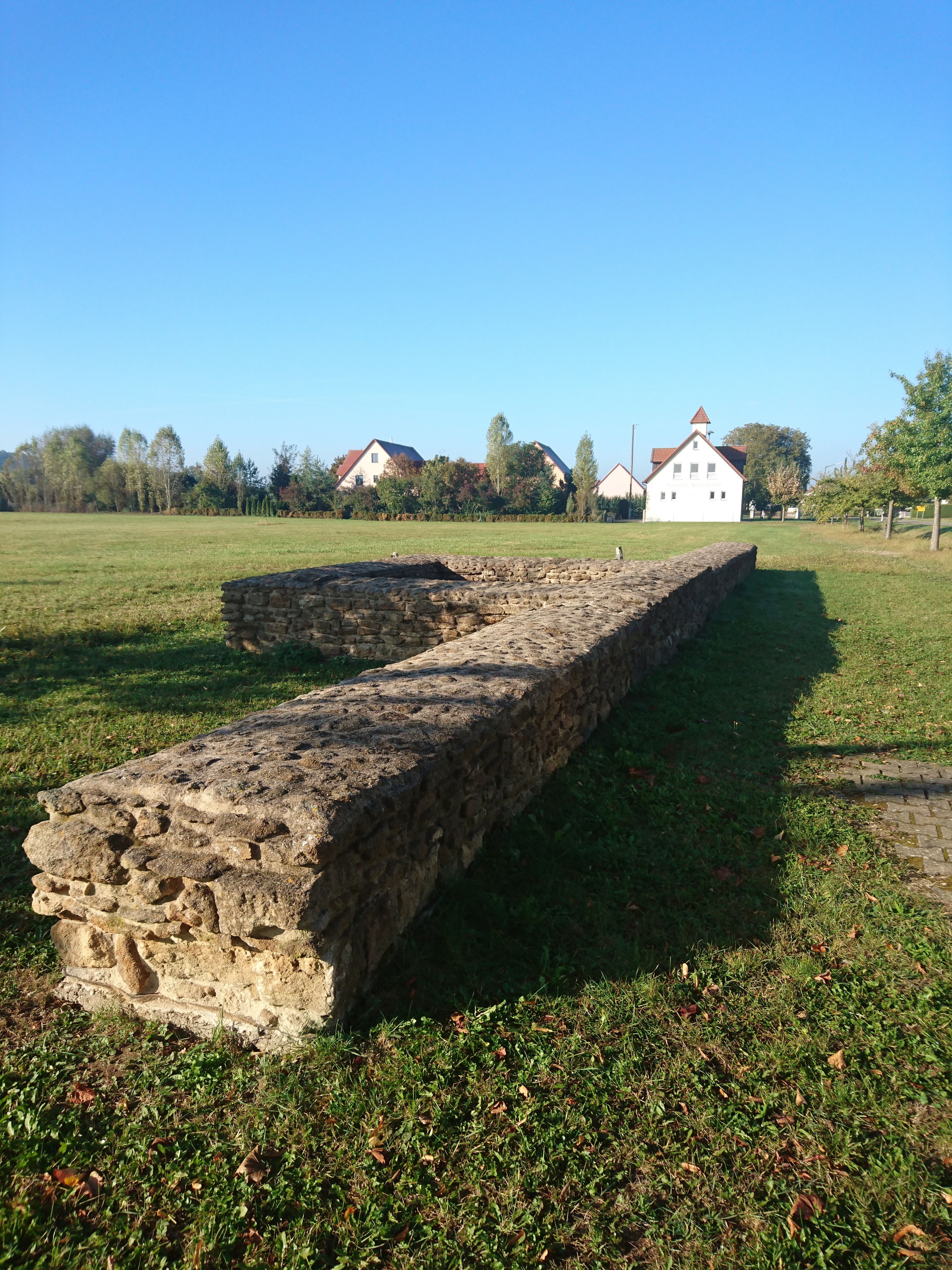 Hier ist die rekonstruierte Grundmauer eines römischen Wachturms der entlang des Limes lag.